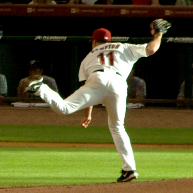 Mike Hampton